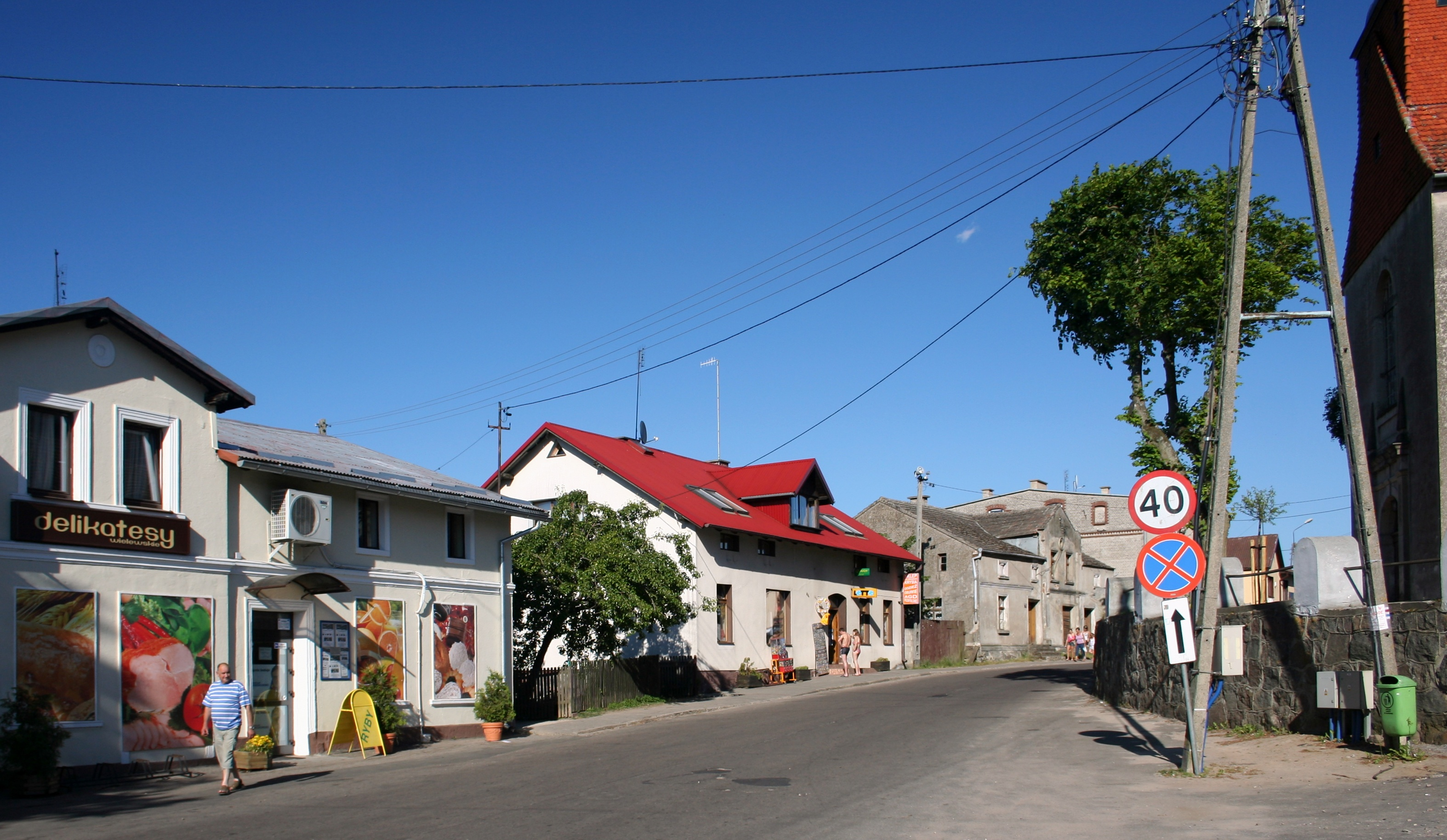 Centralna część wsi Wiele, woj. pomorskie